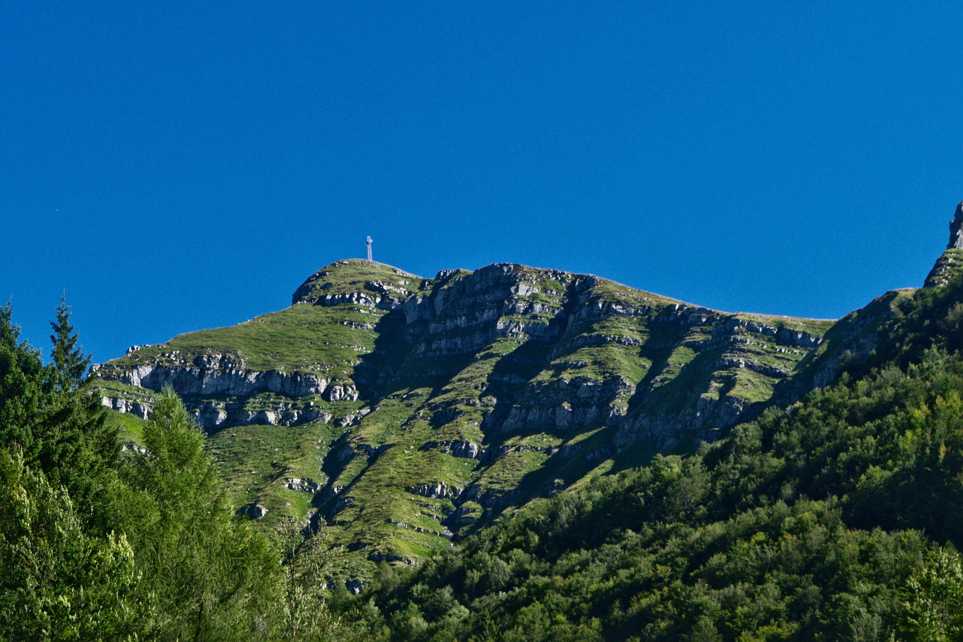 Parete settentrionale del Corno alle Scale (1945 m s.l.m.), nel comune di Lizzano in Belvedere (BO)